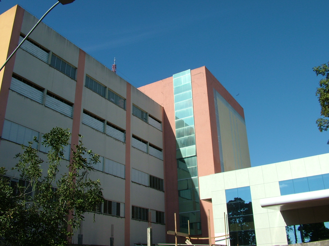 Hospital do Câncer